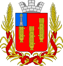 Герб Алатыря 1863-1917 гг.